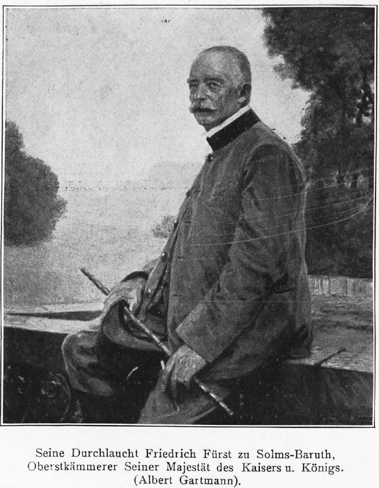 Friedrich II. Hermann Johann Georg von Solms, 2ter Fürst zu Solms-Baruth (1853-1920), deutscher Politiker, Oberstkämmerer und Mitglied des Preußischen Herrenhauses.